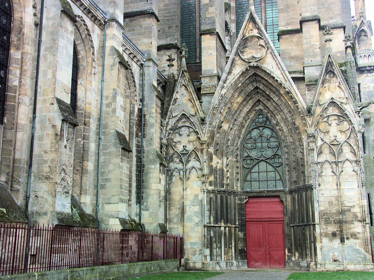 Cathédrale Saint-Gervais-et-Saint-Protais de Soissons, France